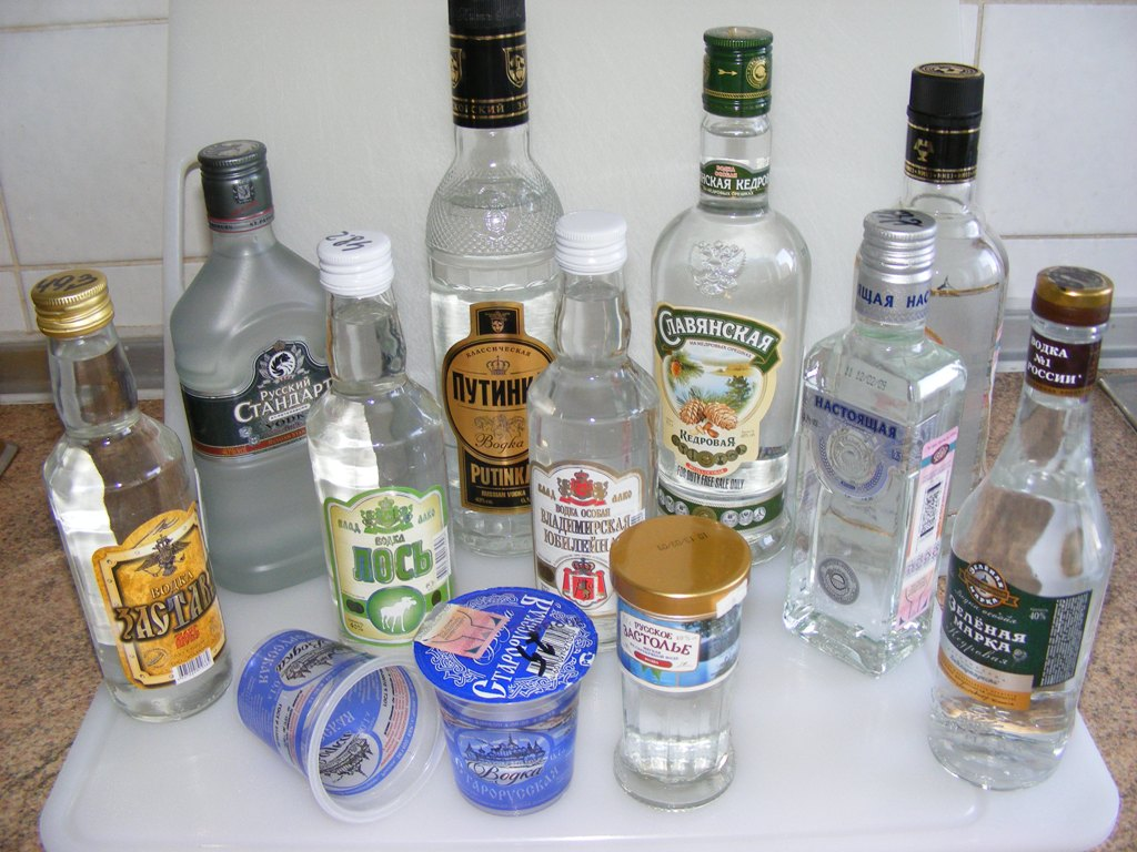 Wodka in verschieden kleinen Flaschen und Gläsern und Bechern.